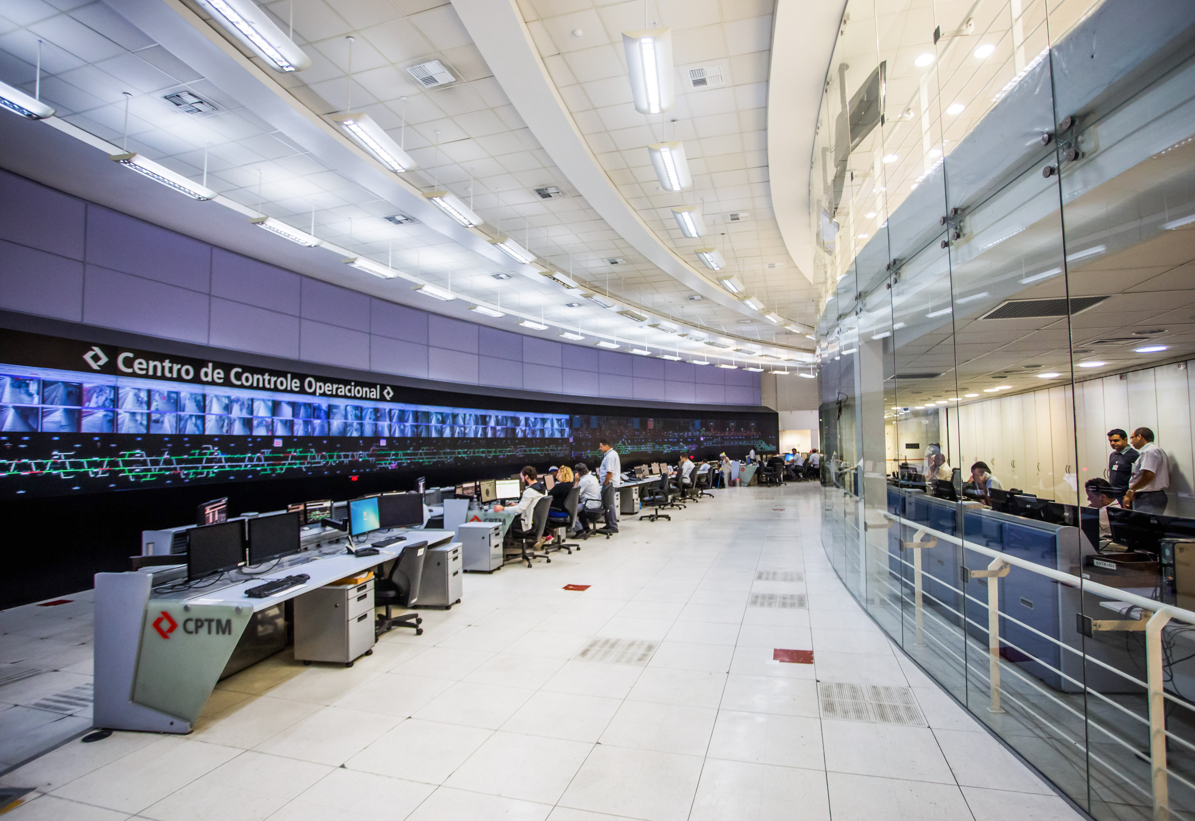 O Governador do Estado de São Paulo, Dr. Geraldo Alckmin, esteve presente na Entrega do 7o.trem (da série 8.500) para a linha 7 - Rubi da CPTM e Comemoração dos 10 anos de operação do CCO, na Estação Brás da CPTM . Local: São Paulo/SP. Data: 18/11/2016. Foto: Alexandre Carvalho/A2img